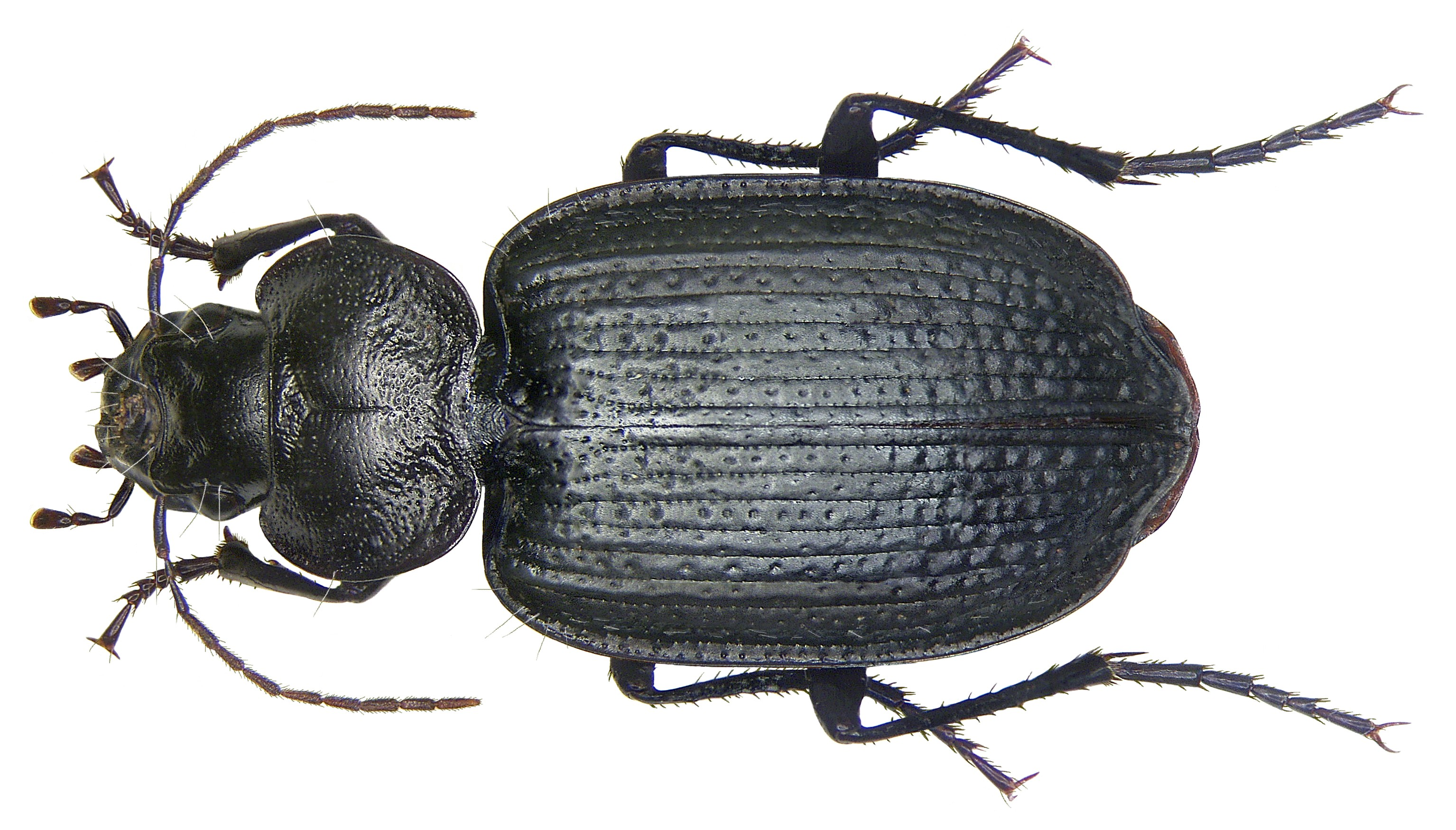 Familie: Carabidae Größe: 13-17 mm Verbreitung: Nordafrika, Südwesteuropa, Mitteleuropa, Westeuropa Ökologie: in trockenen, warmen und offenen Lebensräumen Fundort: Mallorca, Paguera leg.det. U.Schmidt, 1973 Foto: U.Schmidt, 2008